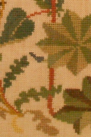 Detalj av korsstygn. Detalj ur tavlan "Blommorna vid vägen" efter mönster av Clara Waever. Se även: Brännässla i korsstygn Tavlan i sin helhet